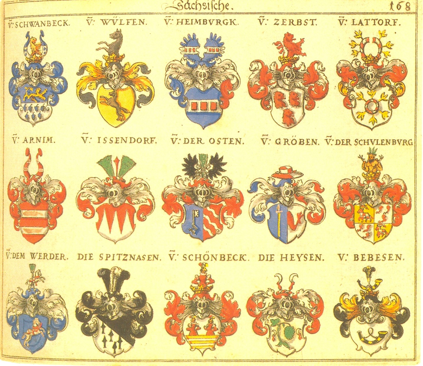 Johann Siebmacher: New Wappenbuch eingescannt aus: Horst Appuhn (Hrsg.), Johann Siebmachers Wappenbuch. Die bibliophilen Taschenbücher 538, 2. verb. Aufl , Dortmund 1989 Sachsen, Blatt 168 Schwanbeck, Wülfen, Heimburgk, Zerbst, Lattorf, Arnim, Issendorf von der Osten, von der Groeben, von der Schulenburg, von dem Werder, Spitznasen, Schönbeck, Heysen, Bebesen